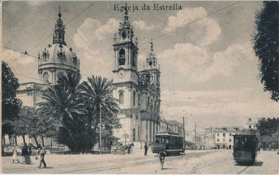 Estação no Largo da Estrela junto à Basílica, vendo-se a par o ascensor e já o carro elétrico.